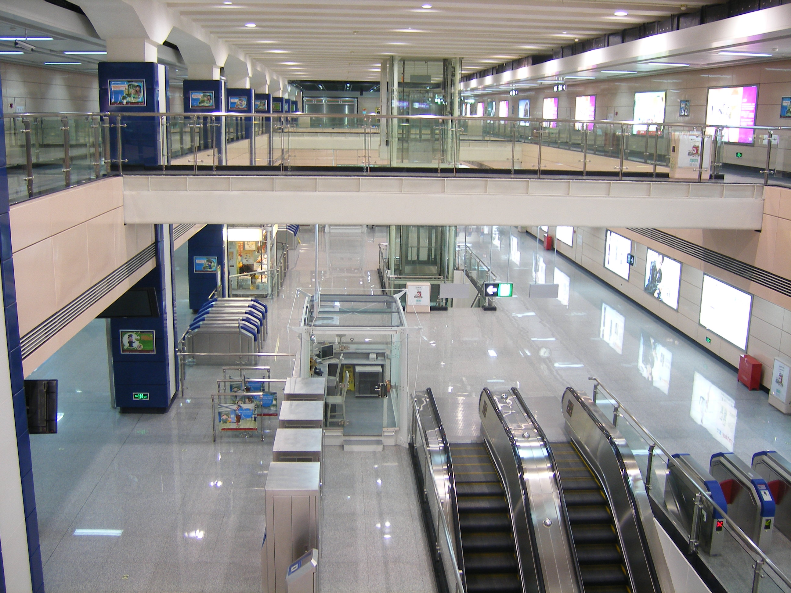 广州地铁赤岗塔站大堂。